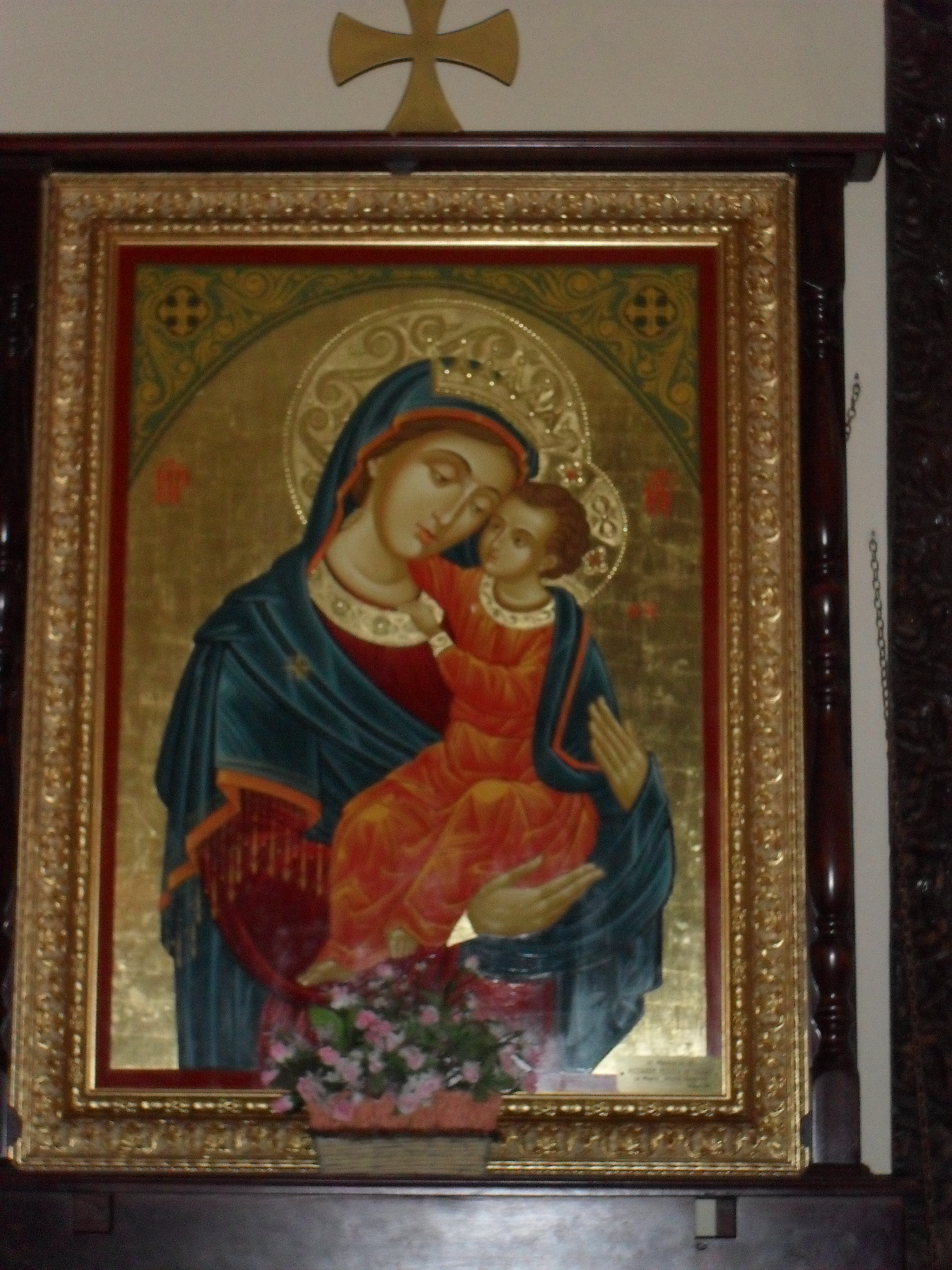 Icona della Madonna del Buon Consiglio presso San Benedetto Ullano (CS)